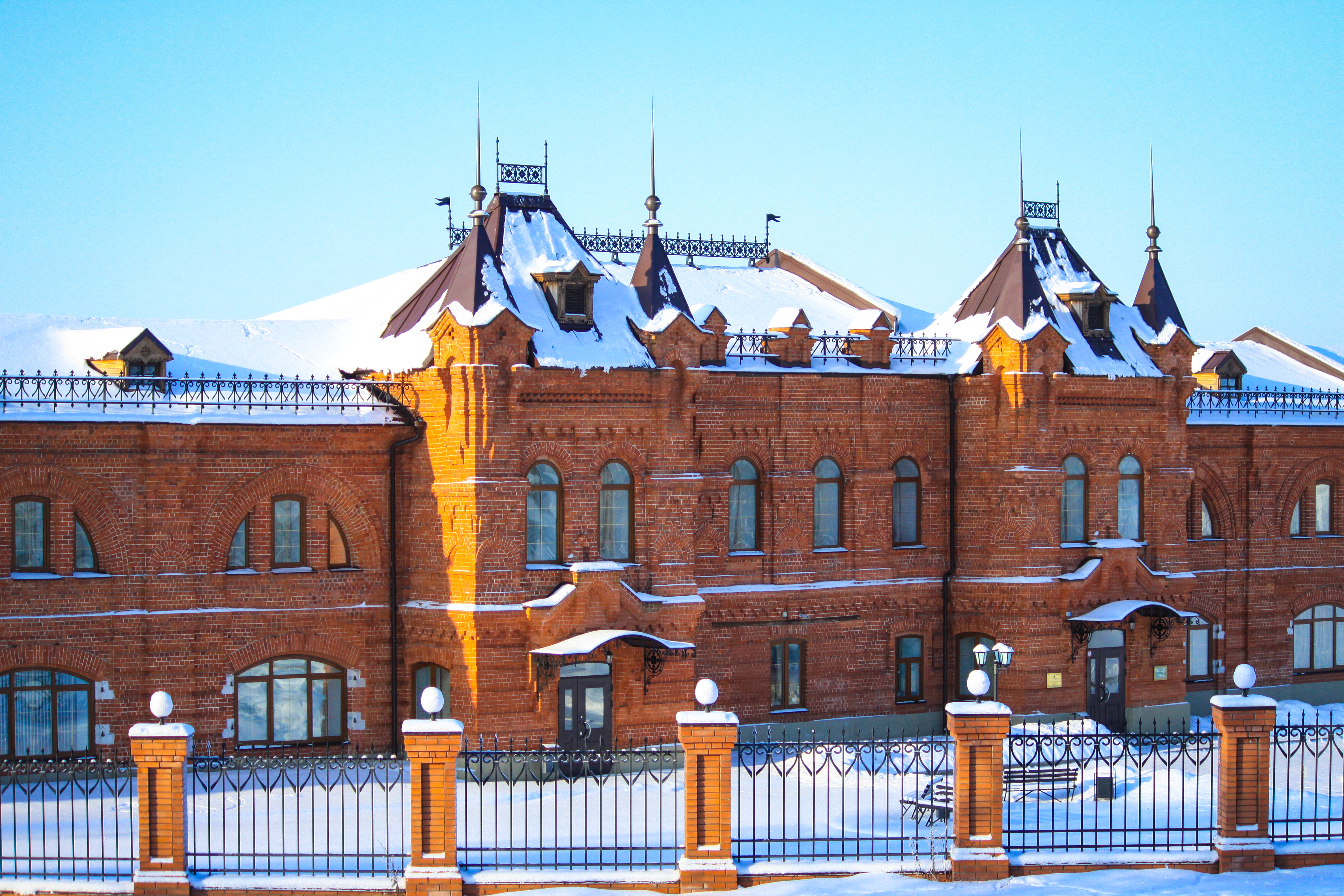 Городская Дума (Владимирская область, Ковров, улица Першутова, 16)